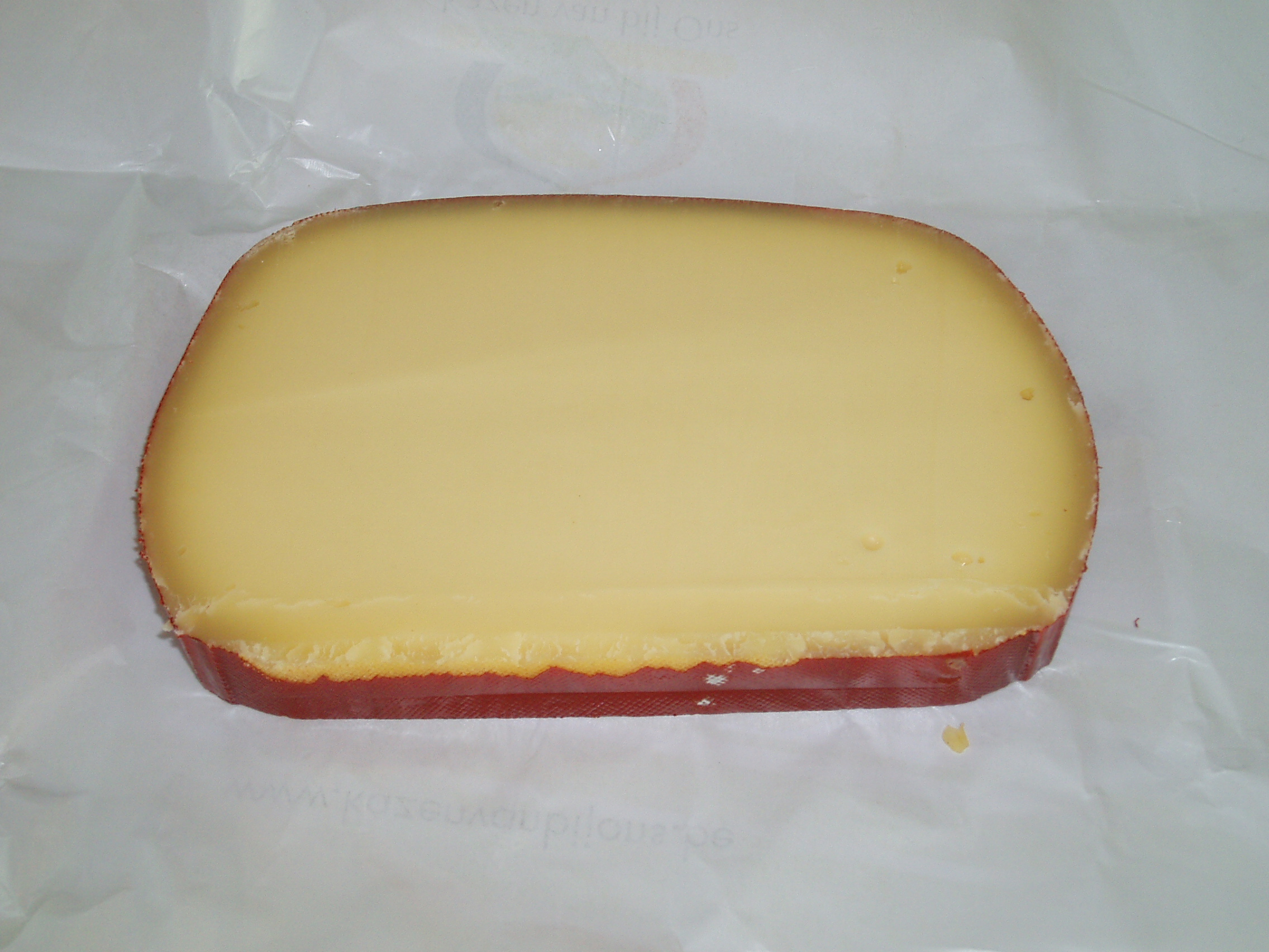 Westmalle kaas